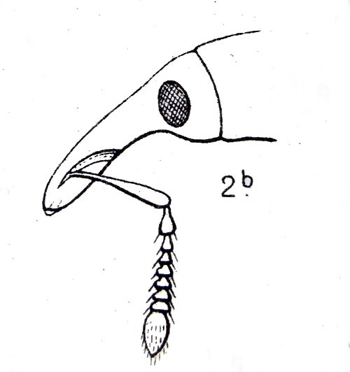 Cossonus linearis, Kopf, Seitenansicht mit Fühlergrube, Zeichnung